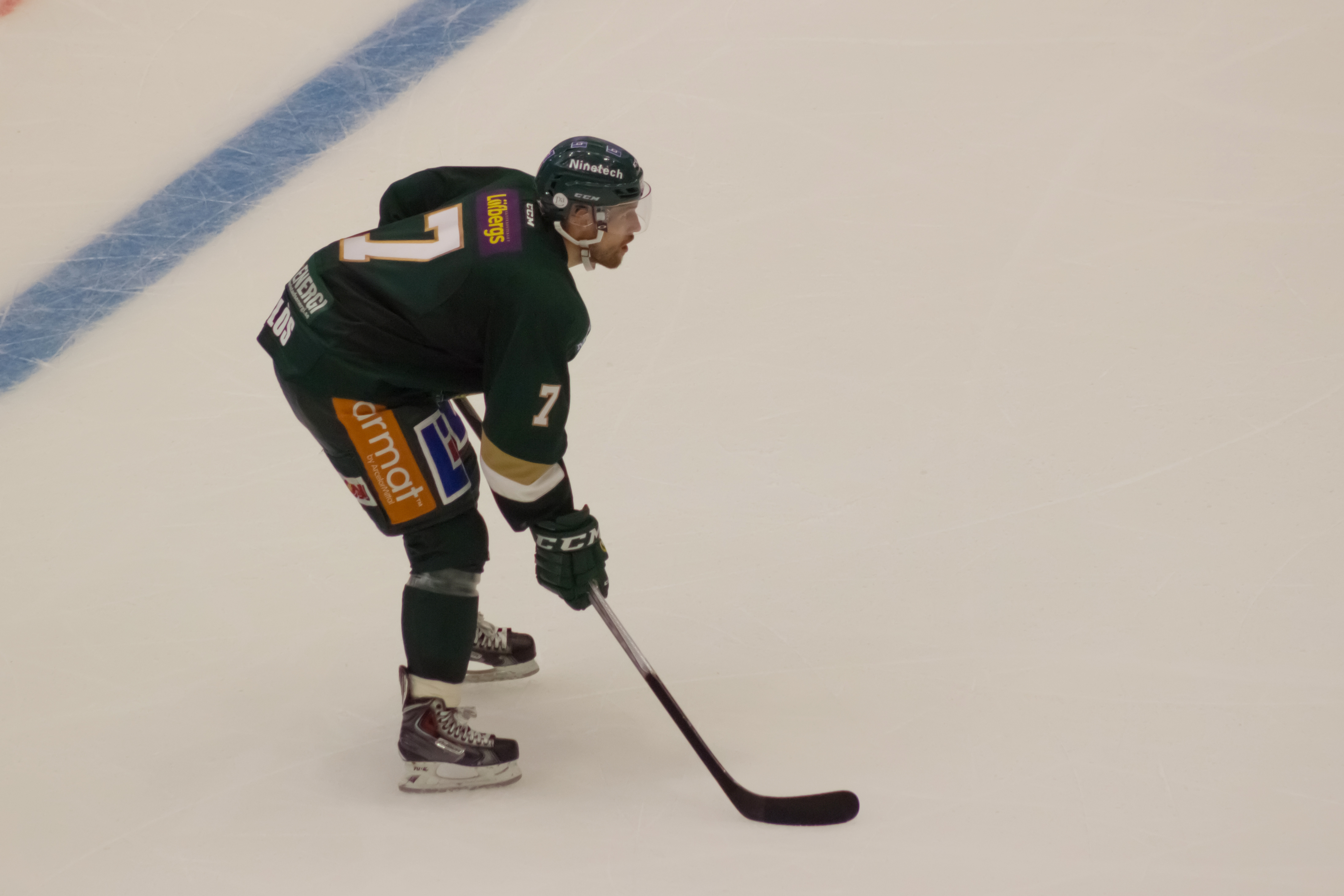 Jonas Holøs, xogador do Färjestads BK, nun partido de liga contra o Brynäs IF no Löfbergs Arena de Karlstad.